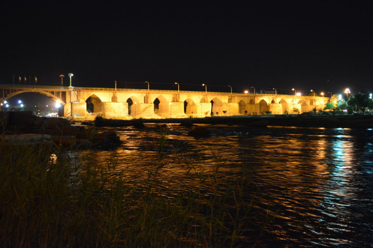 پل ساسانی